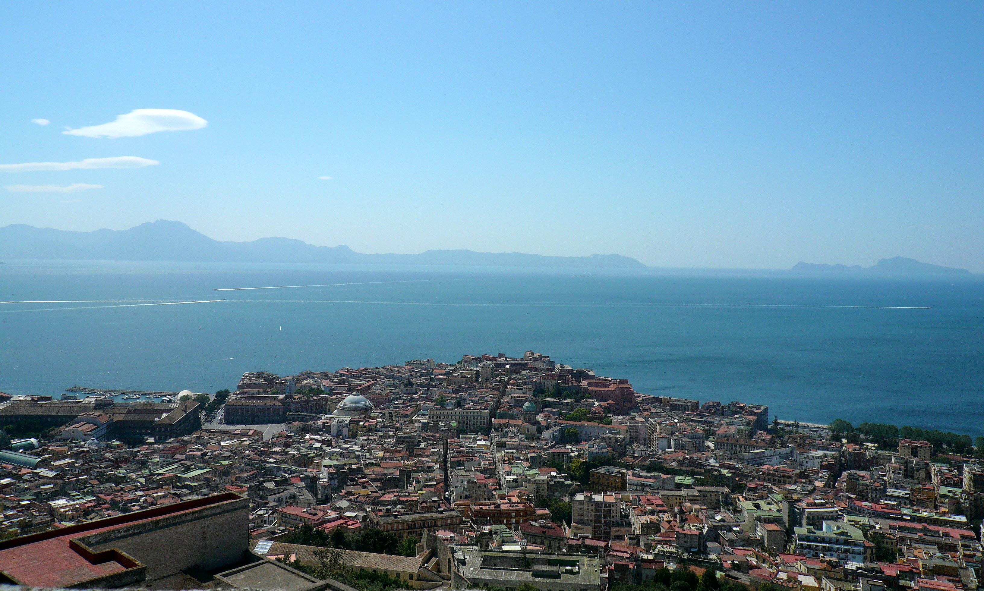 veduta da Castel Sant'Elmo (Napoli) sule zone di Chiaia e Pizzofalcone. Sullo sfondo la Penisola Sorrentina e l'isola di Capri. Autore foto: Roberto De Martino